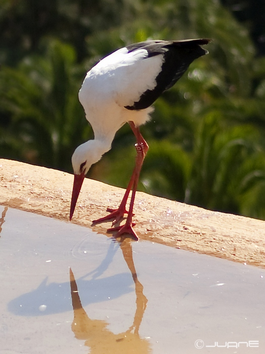 CIGÜEÑA COMÚN. (Ciconia ciconia)